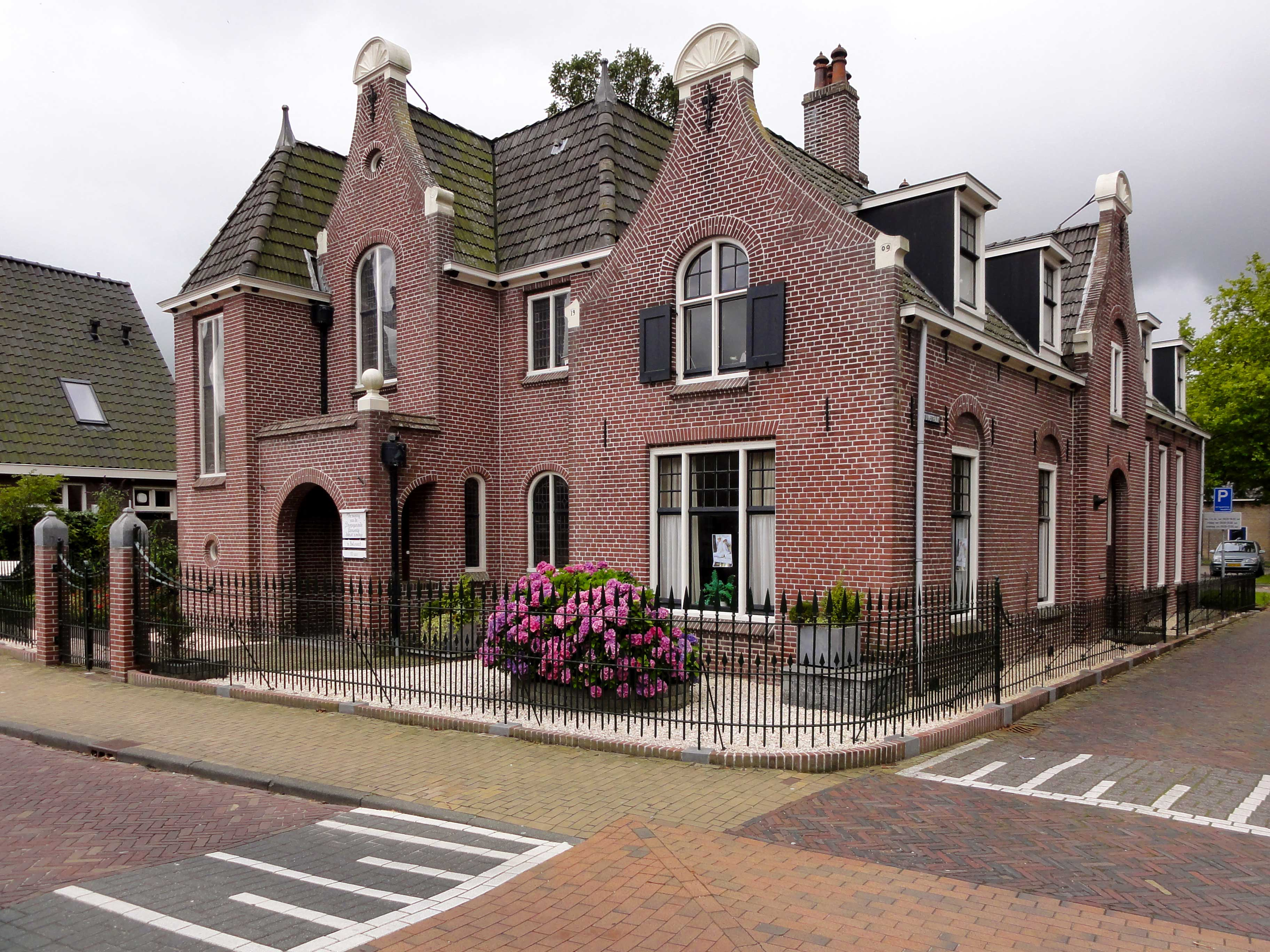 Bleekstraat 11 te Makkum, doopsgezinde kerk met kosterswoning